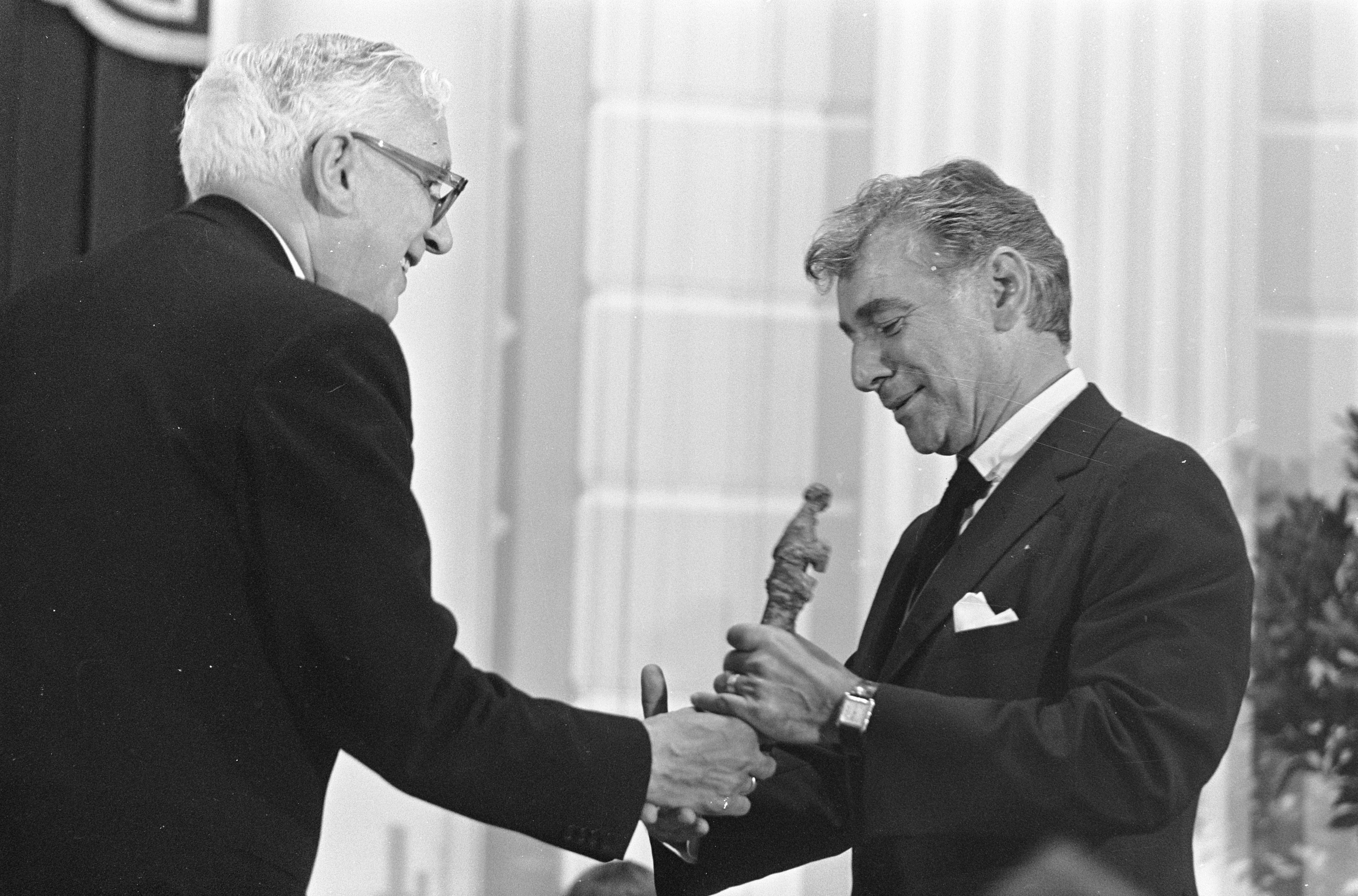 Prof.dr. Ph.J. Idenburg reikt het beeldje van de Edison klassiek uit in het Concertgebouw te Amsterdam. Amsterdam, 20 september 1968